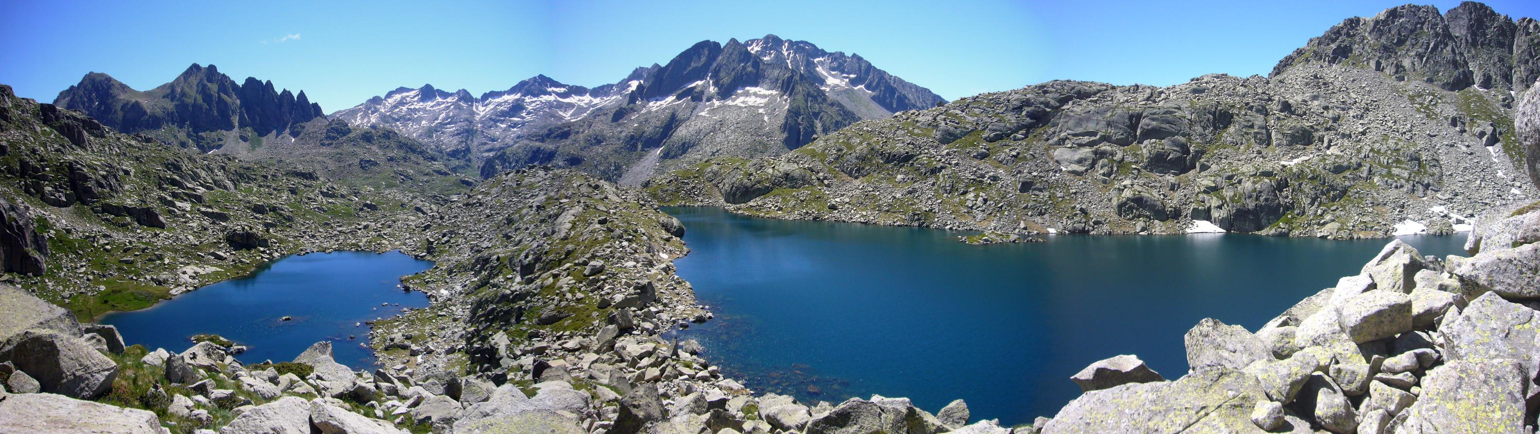 Estanys de Tumeneia; la Vall de Boí, Alta Ribagorça, Catalunya